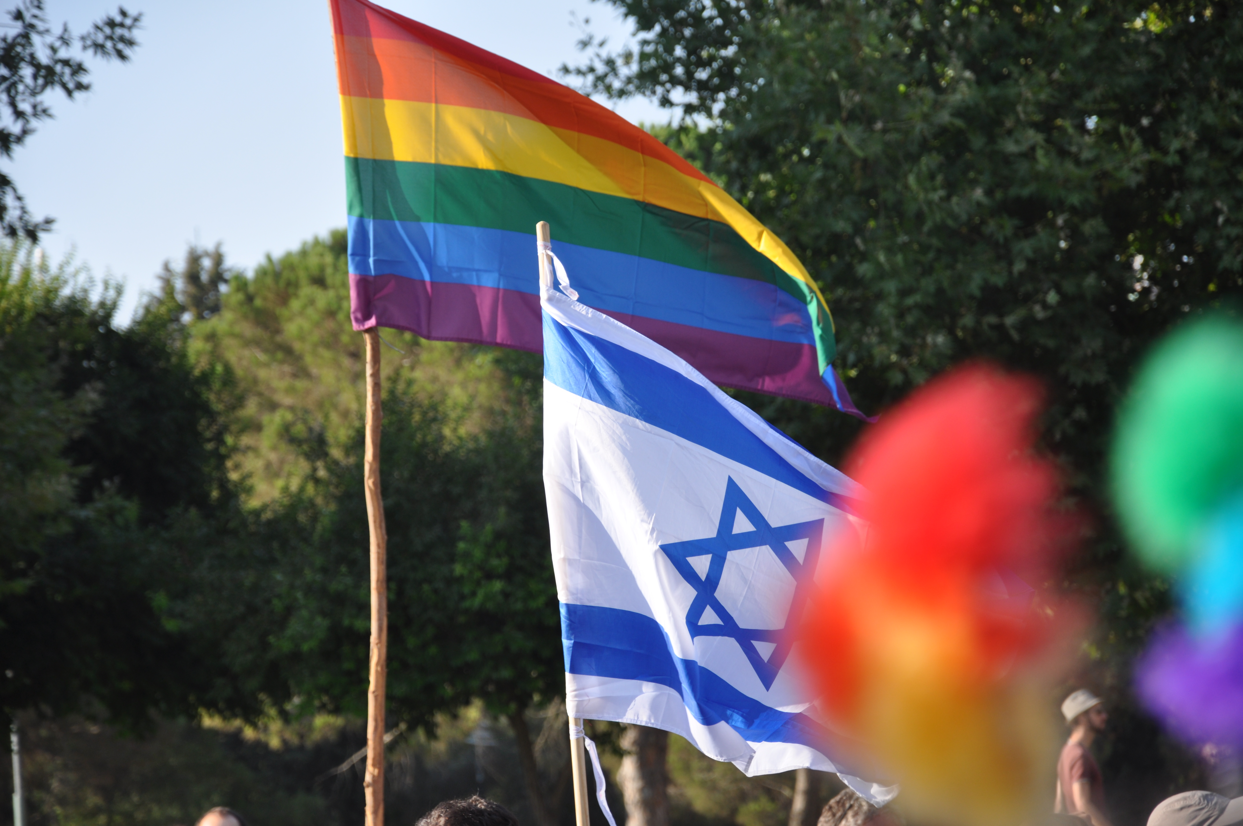 Pride and Israeli flags fly together at Jerusalem Pride 2012